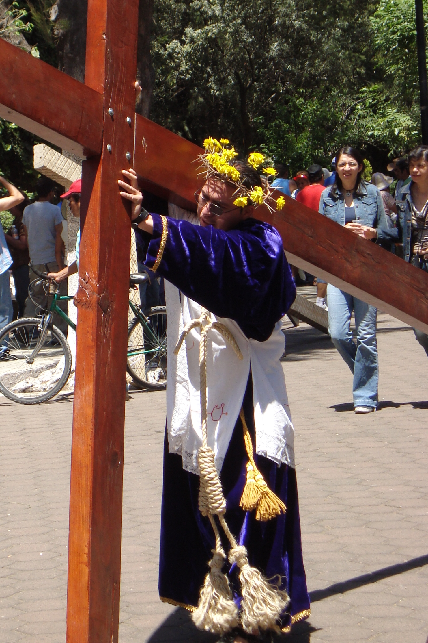 Un nazareno carga su cruz en el atrio del Santuario de La Cuevita en Iztapalapa (México). La indumentaria de los nazarenos de La Cuevita comprende una túnica morada de satín o terciopelo, mantel bordado a mano, lazo, corona de espinas y flores y suelen ir descalzos.